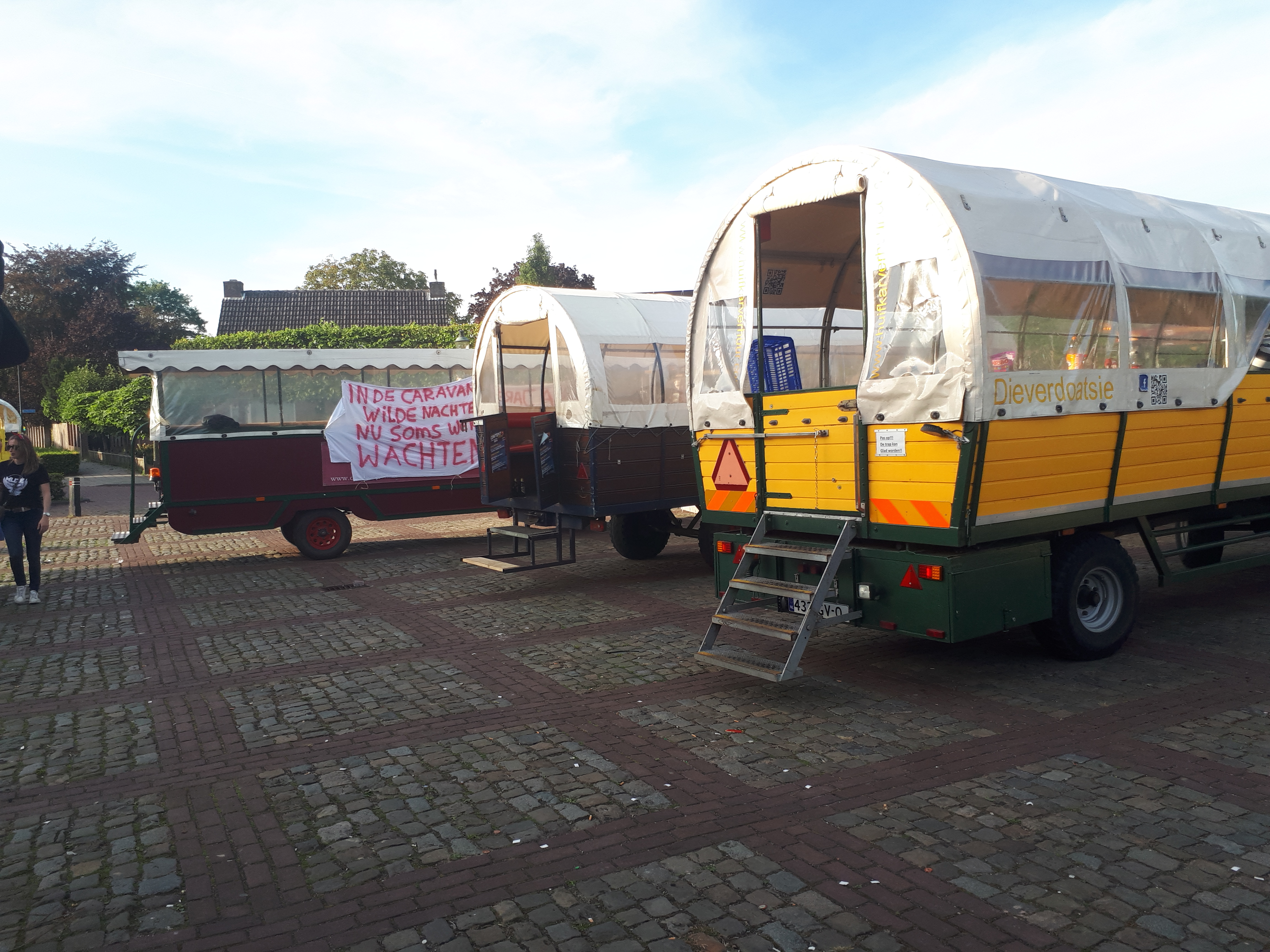 Een aantal huifkarren op het Frans Bruursplein te Casteren.